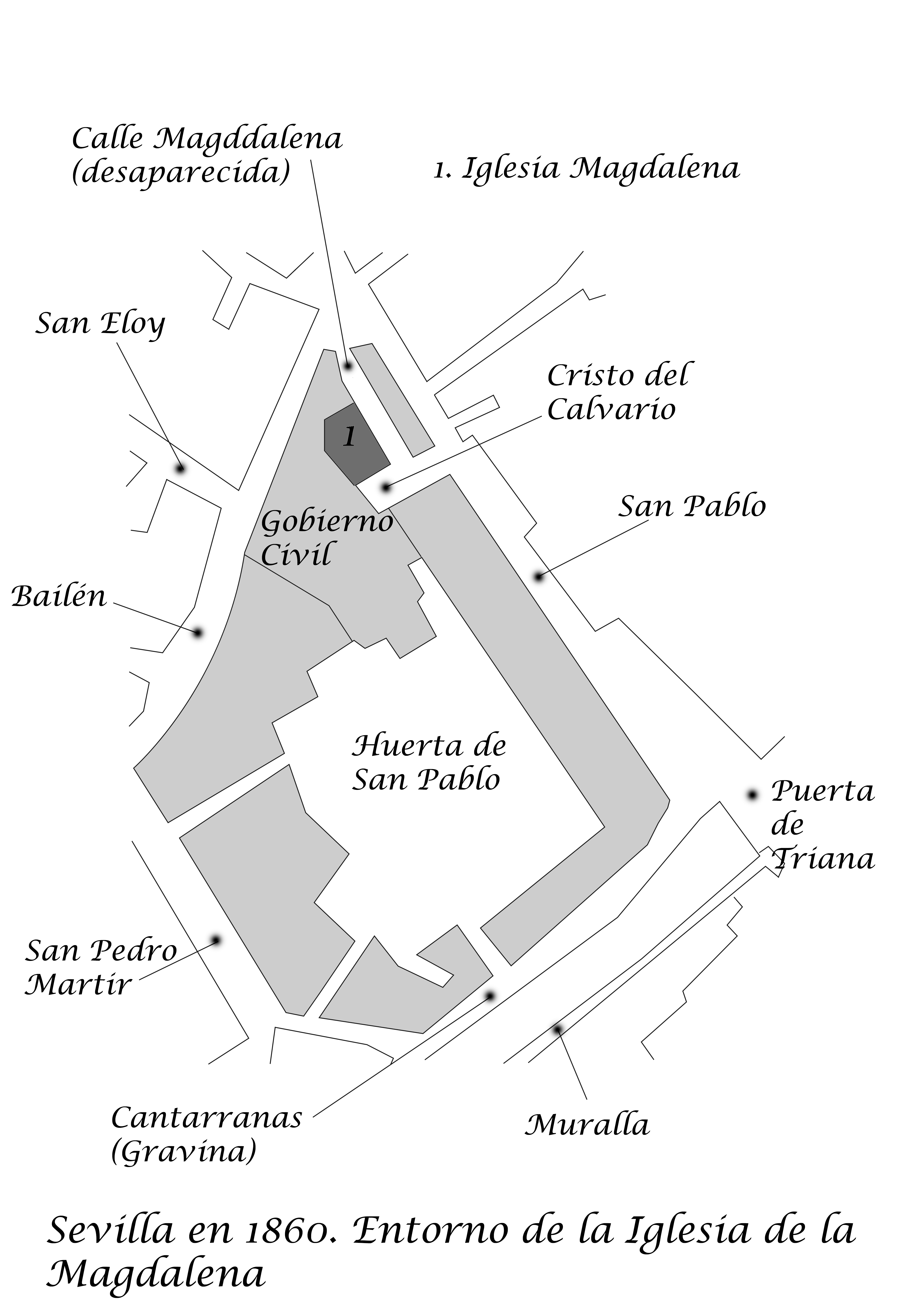 Mapa del entorno de la Iglesia de la Magdalena y el desaparecido convento de San Pablo en 1860.